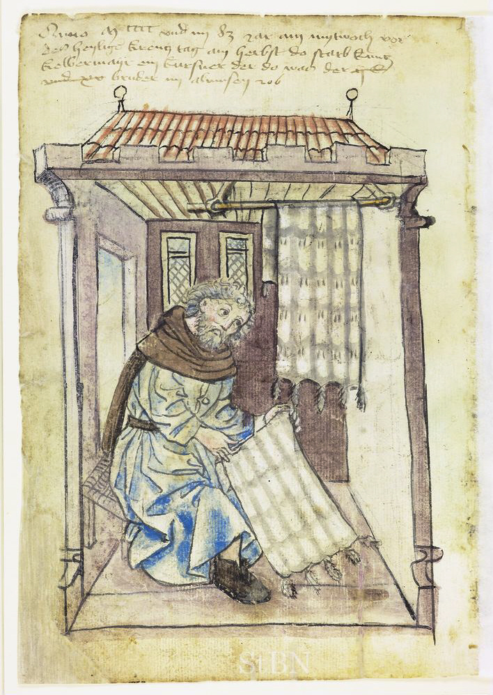 Kuncz (Kunz) Kelbermayr (Kälbermayr) , Kursner (Kürschner), an einem Fehfellwammenfutter arbeitend. Im Hintergrund ein weiteres Fehwammenfutter (Futter sind für etwa ein Pelzteil vorbereitete Felltafeln). Transkription und weitere Informationen